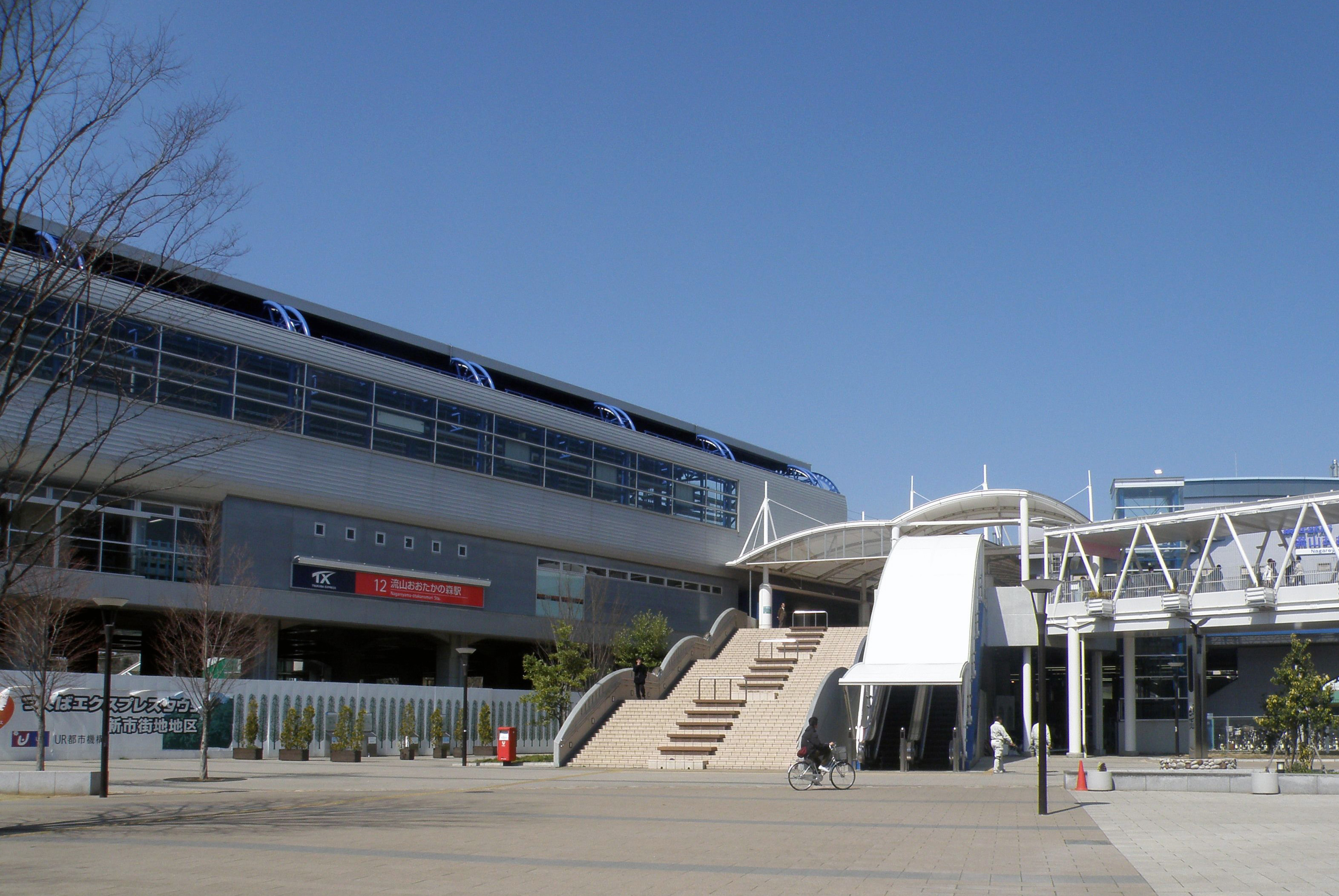 流山おおたかの森駅